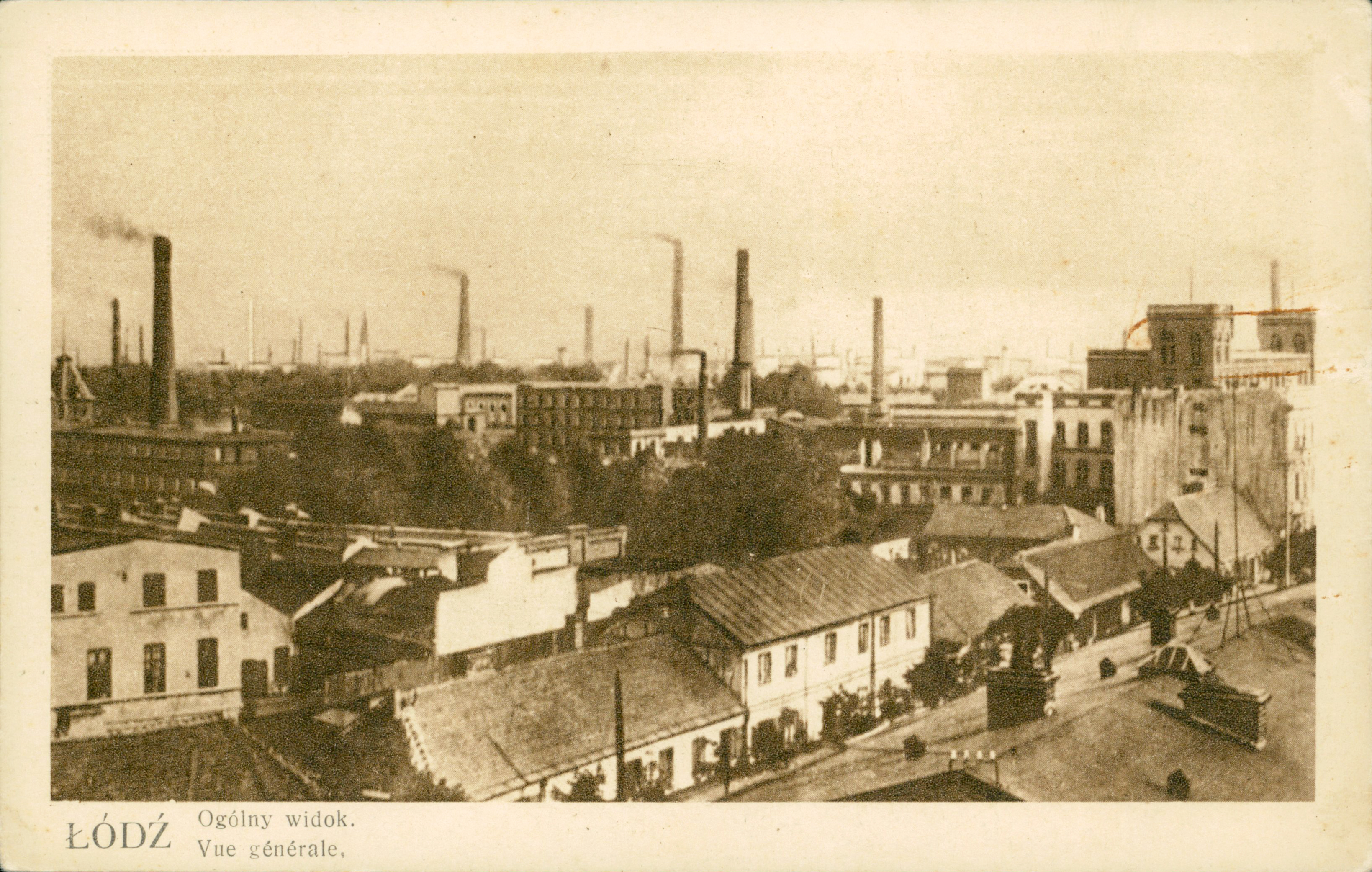 Pocztówka przedstawiająca pejzaż Łodzi w I połowie XX wieku.